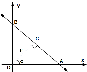 നേർരേഖയുടെ നോർമൽ രൂപം